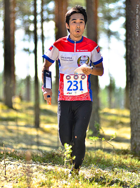 2013年 世界選手権（フィンランド）